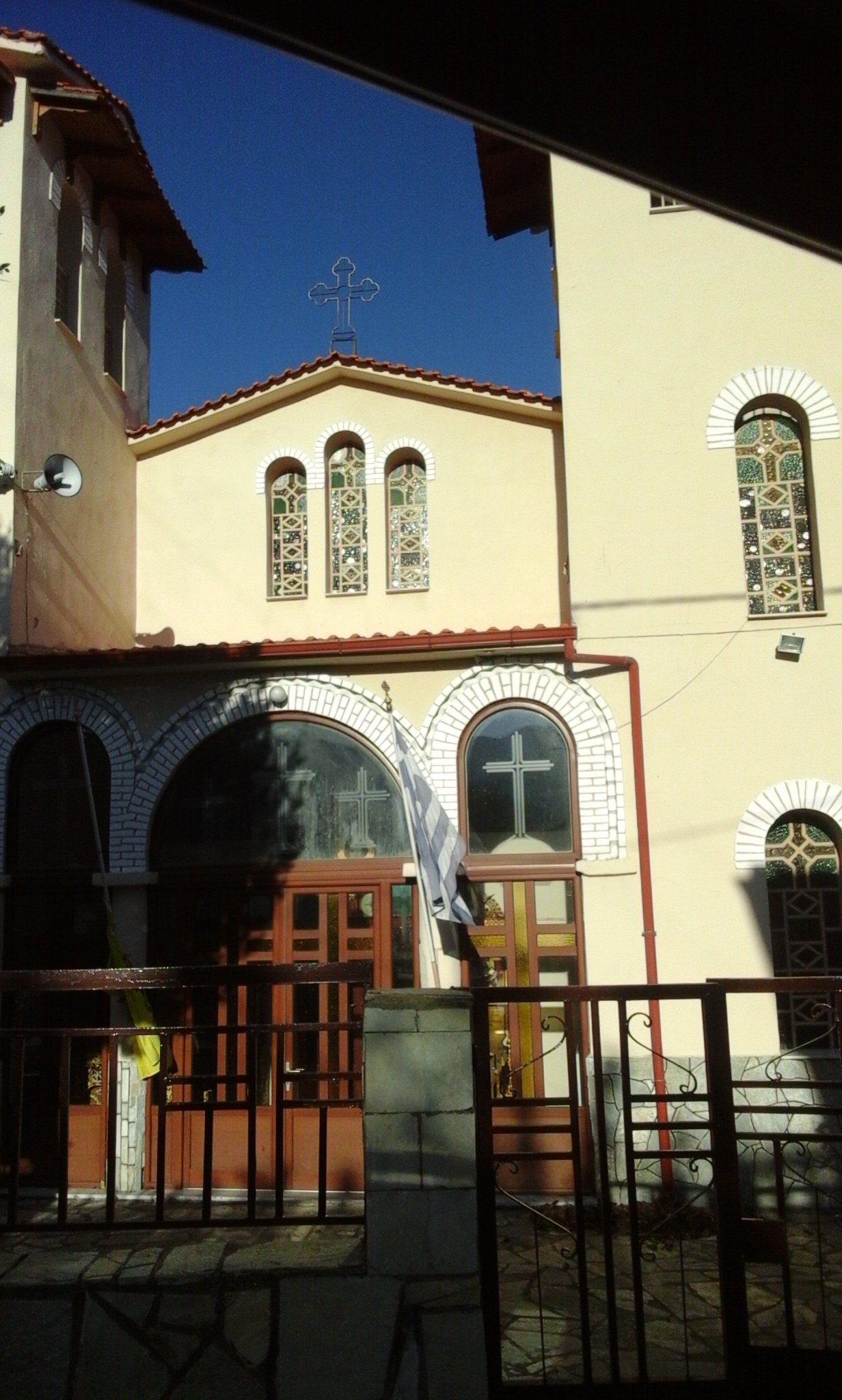 Εκκλησία